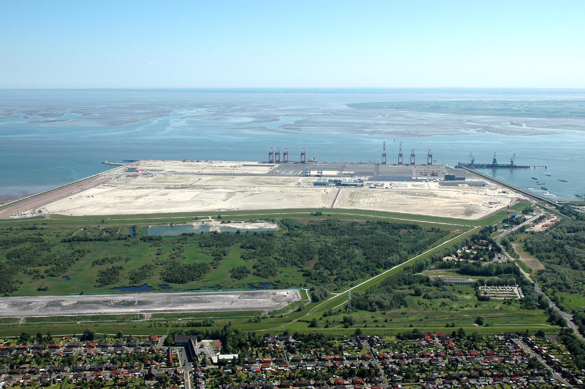 Fotoflug vom Flugplatz Nordholz-Spieka über Cuxhaven und Wilhelmshaven Jade-Weser-Port-Baustelle von Westen gesehen, die Pier rechts hinten ist die Kohlepier vom Kohlekraftwerk